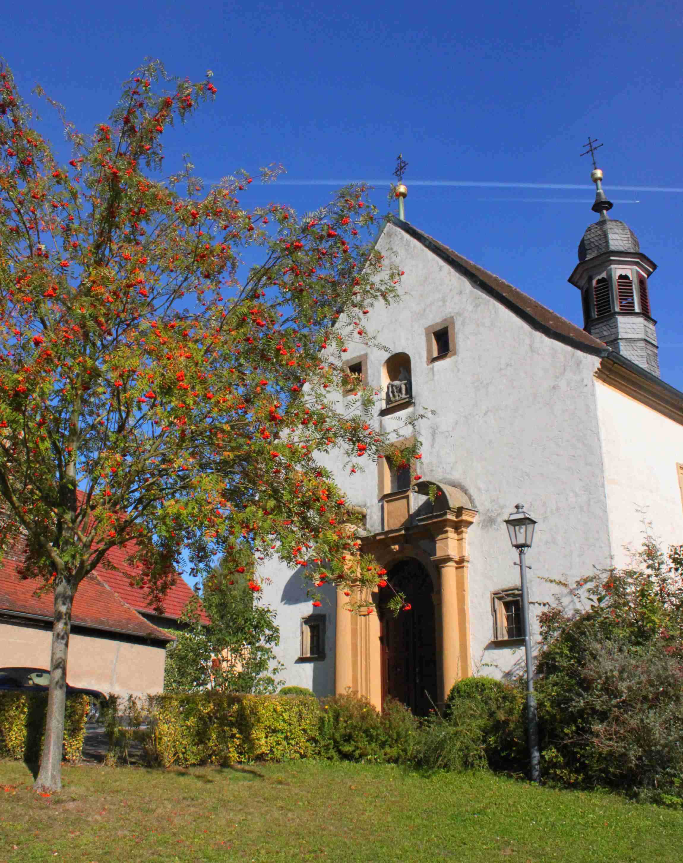 Die Magdalenenkirche in der Ortsmitte von Handthal.